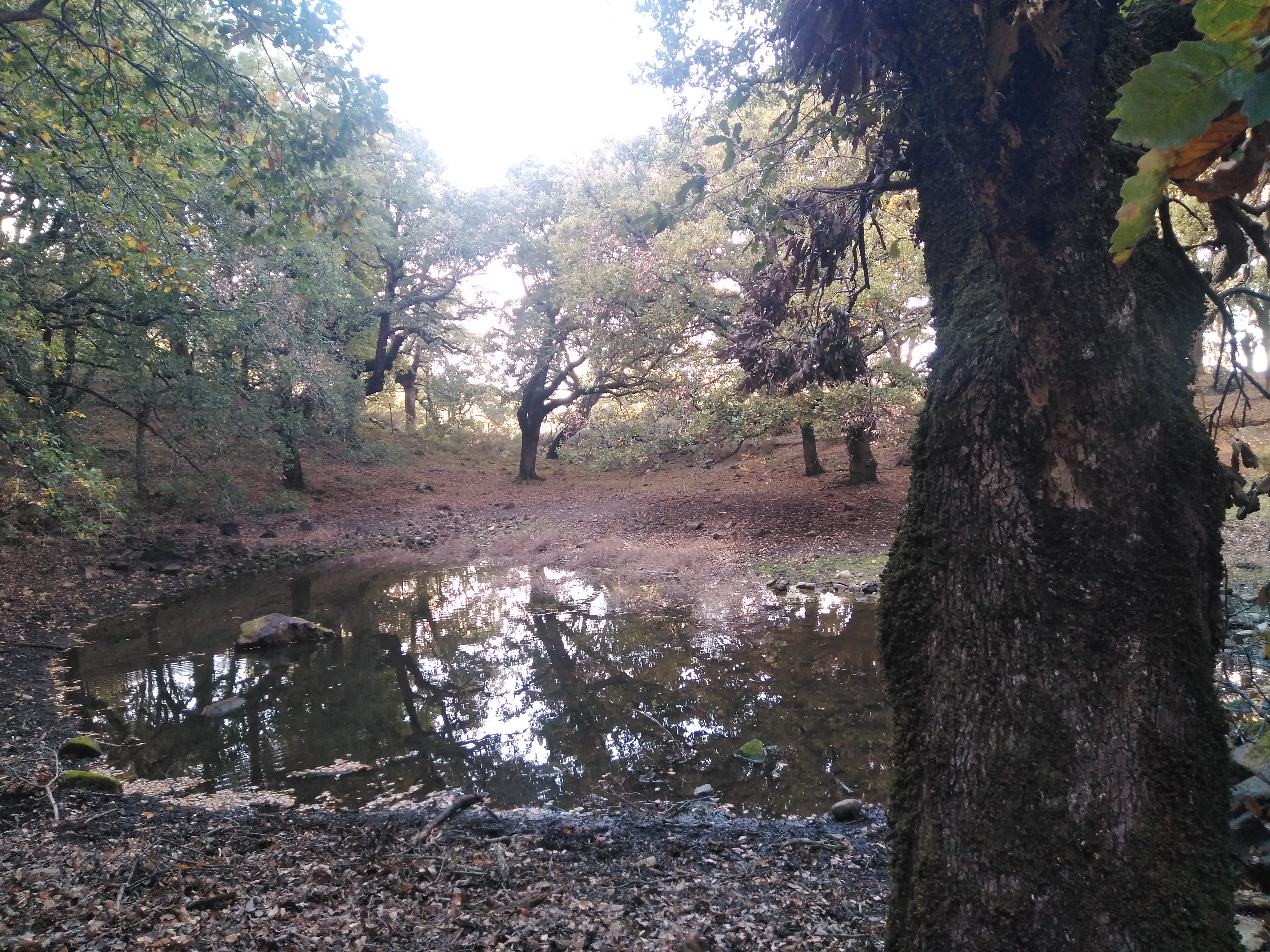 Laguna del Moral en Cortes de la Frontera (provincia de Málaga, España)